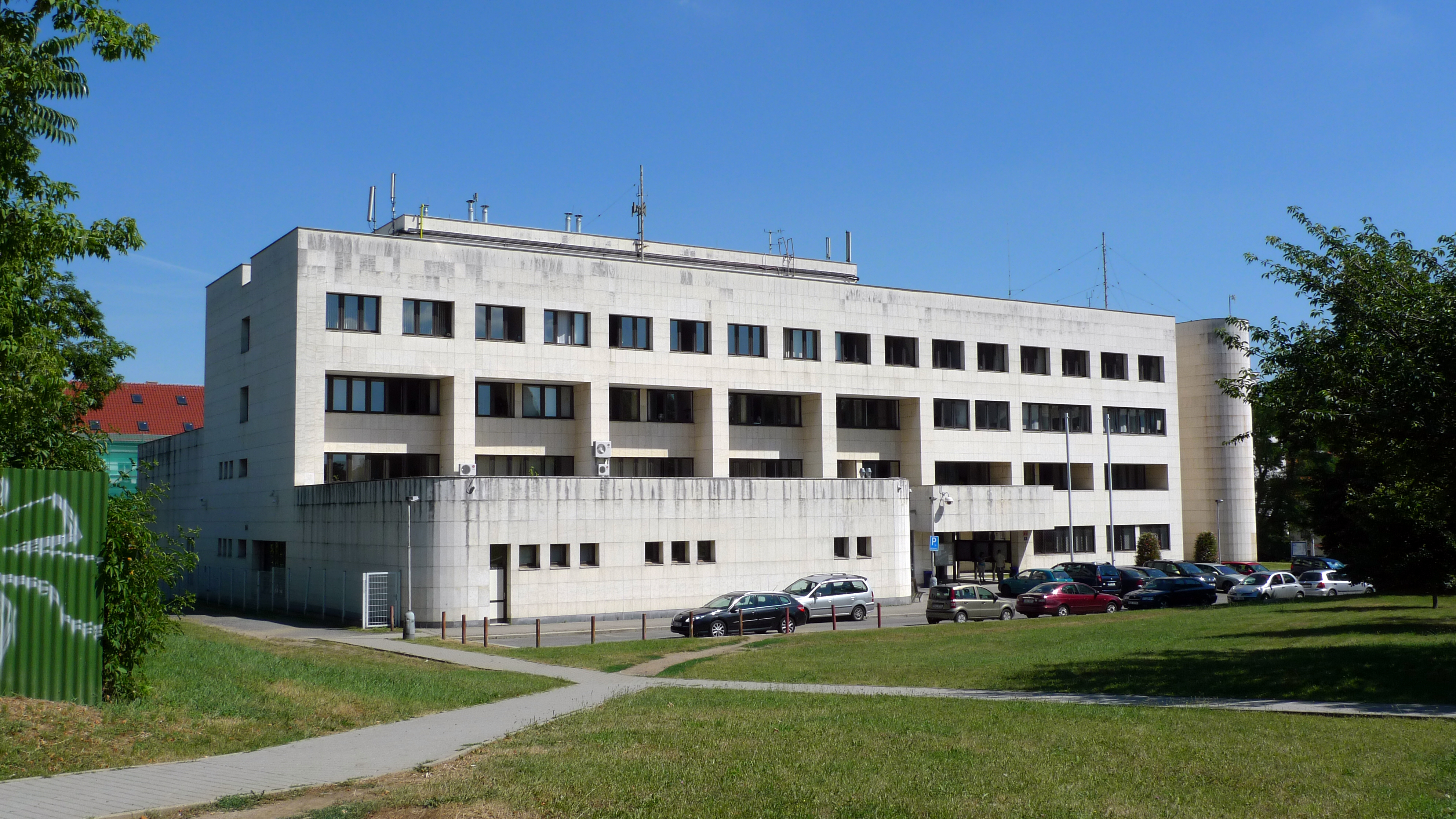 Bílý dům v Praze 8-Libni, sídlo úřadu Městské části Praha 8.